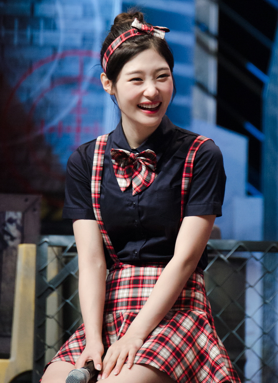 160521 백발백중